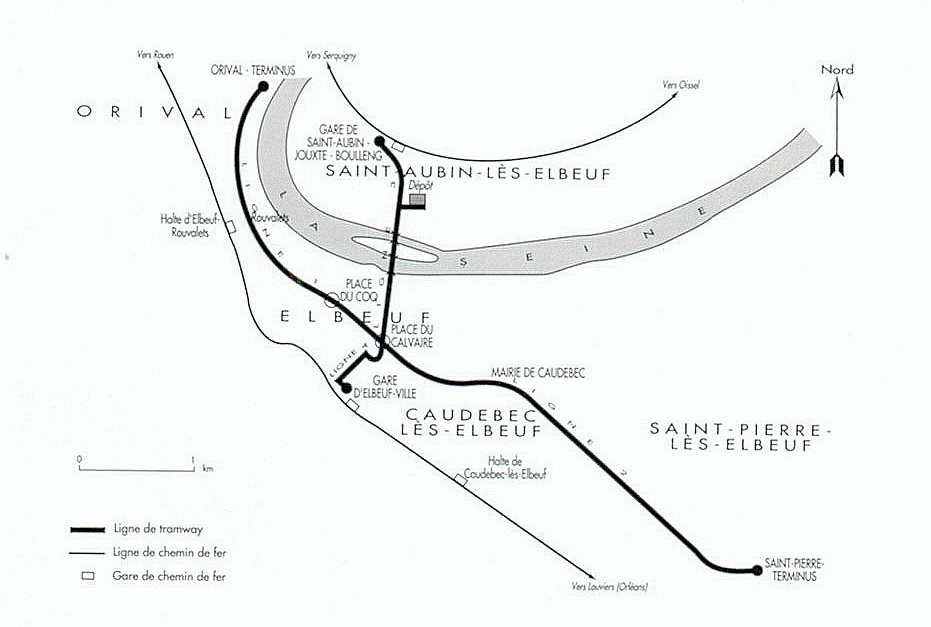 Plan du tramway d'Elbeuf